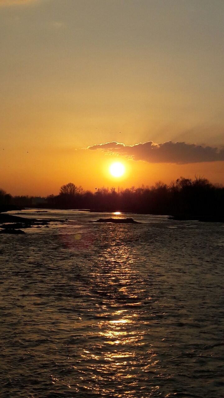 غروب آفتاب مهربان